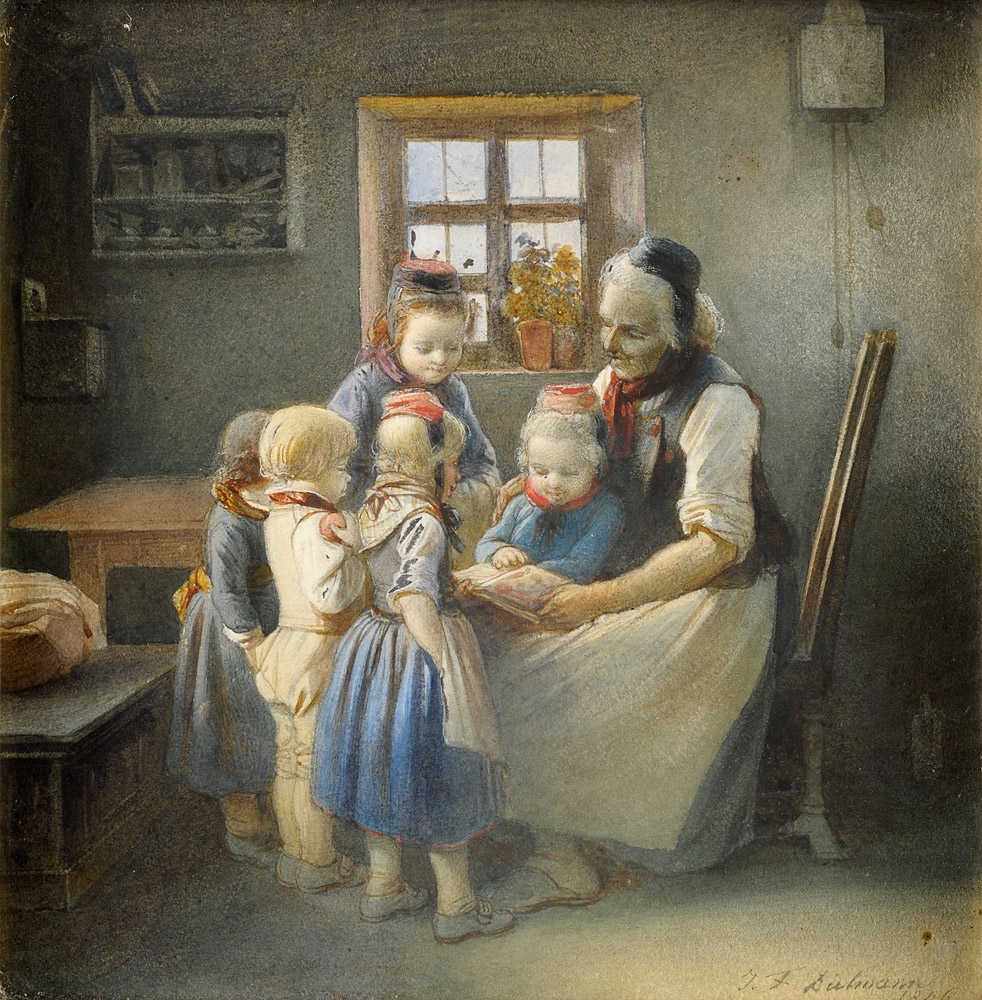 Großmutters Geschichten. Signiert. Datiert 1846. Aquarell. 20 x 19 cm